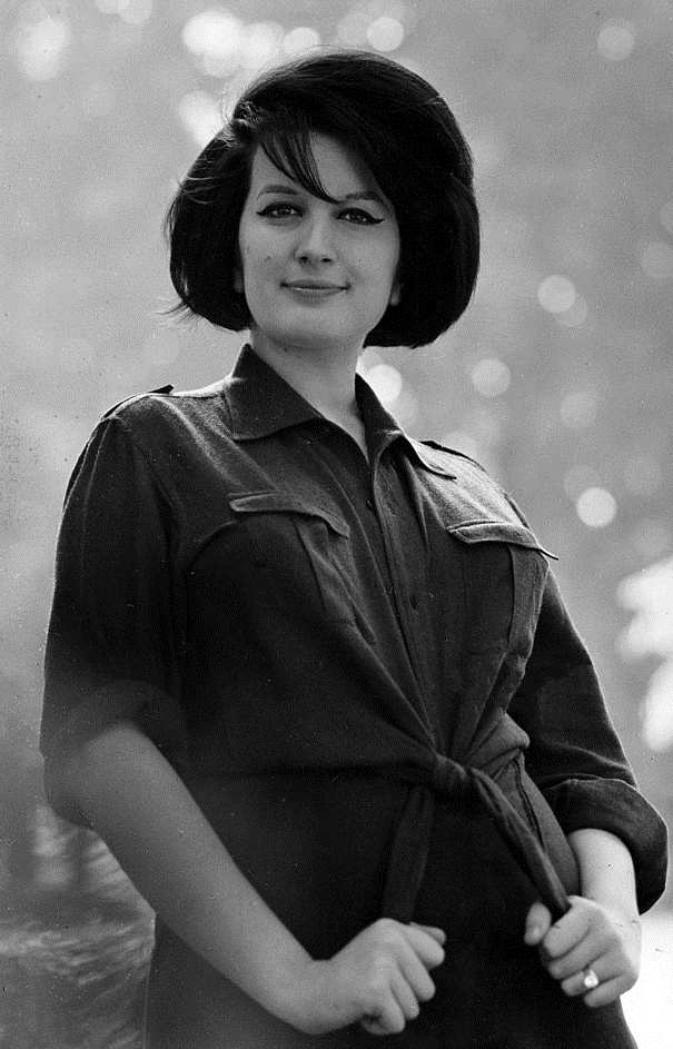 Italian singer Mina (Mina Anna Maria Mazzini)